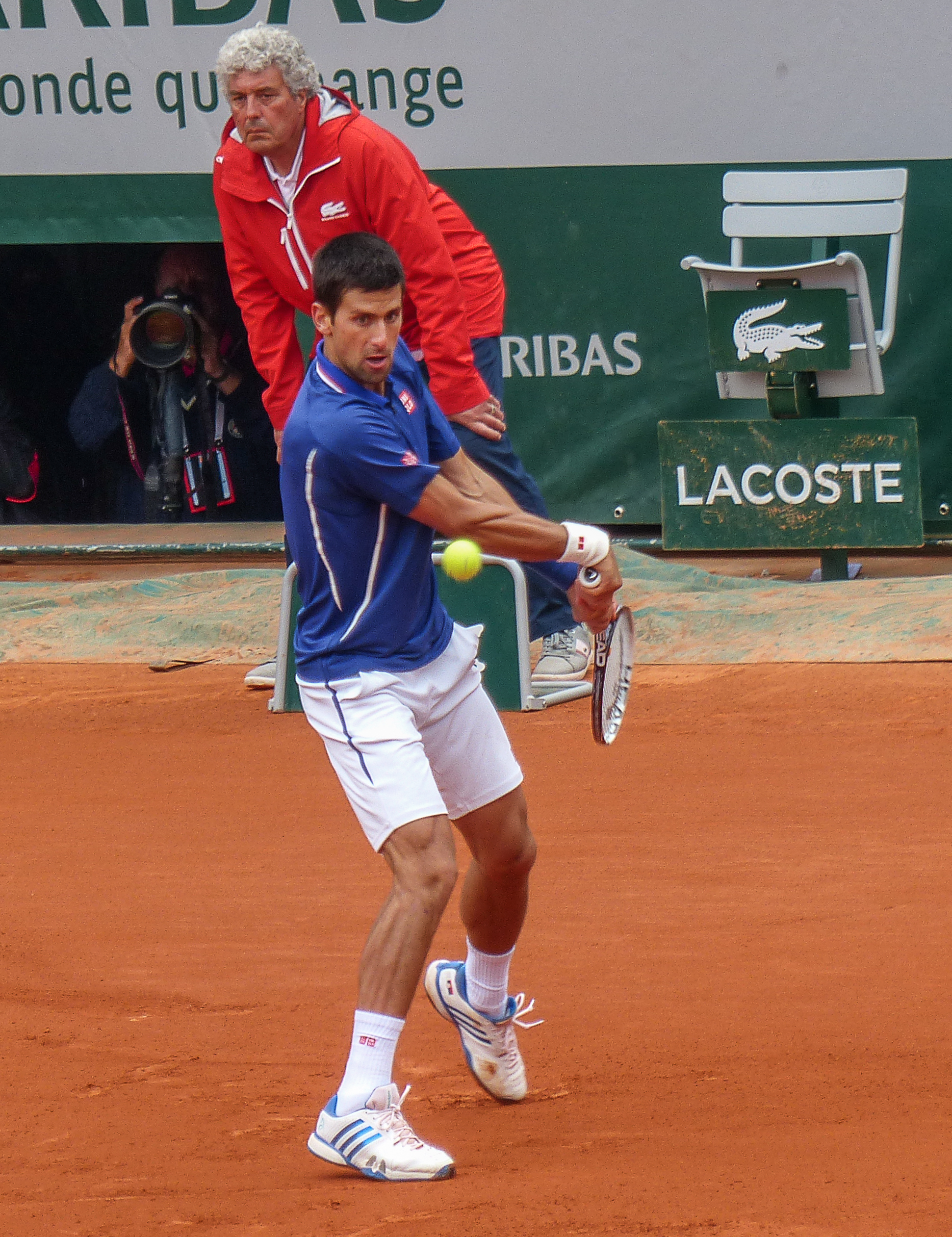 2ème tour Roland Garros 2013 : Novak Djokovic (SRB) def. Guido Pella (ARG)